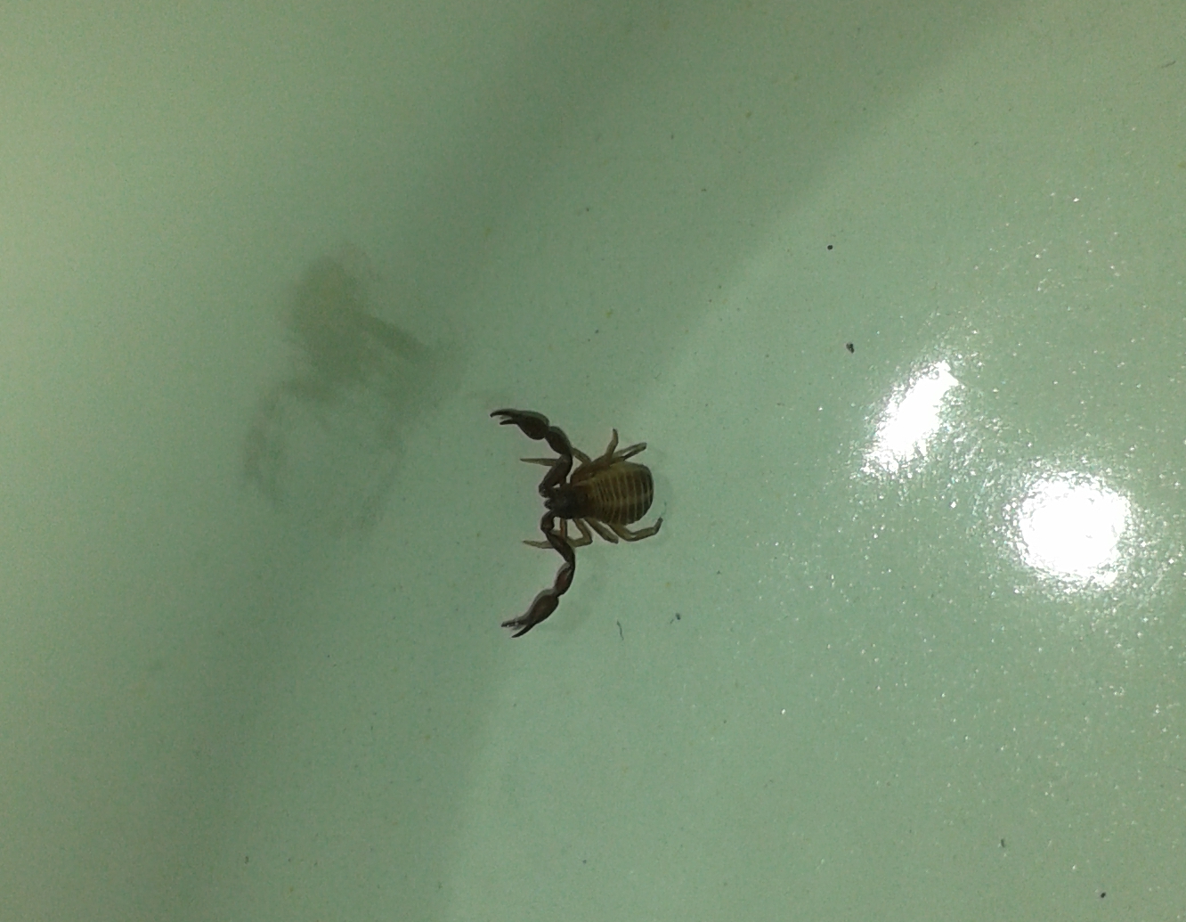 Aracnido con tenazas.